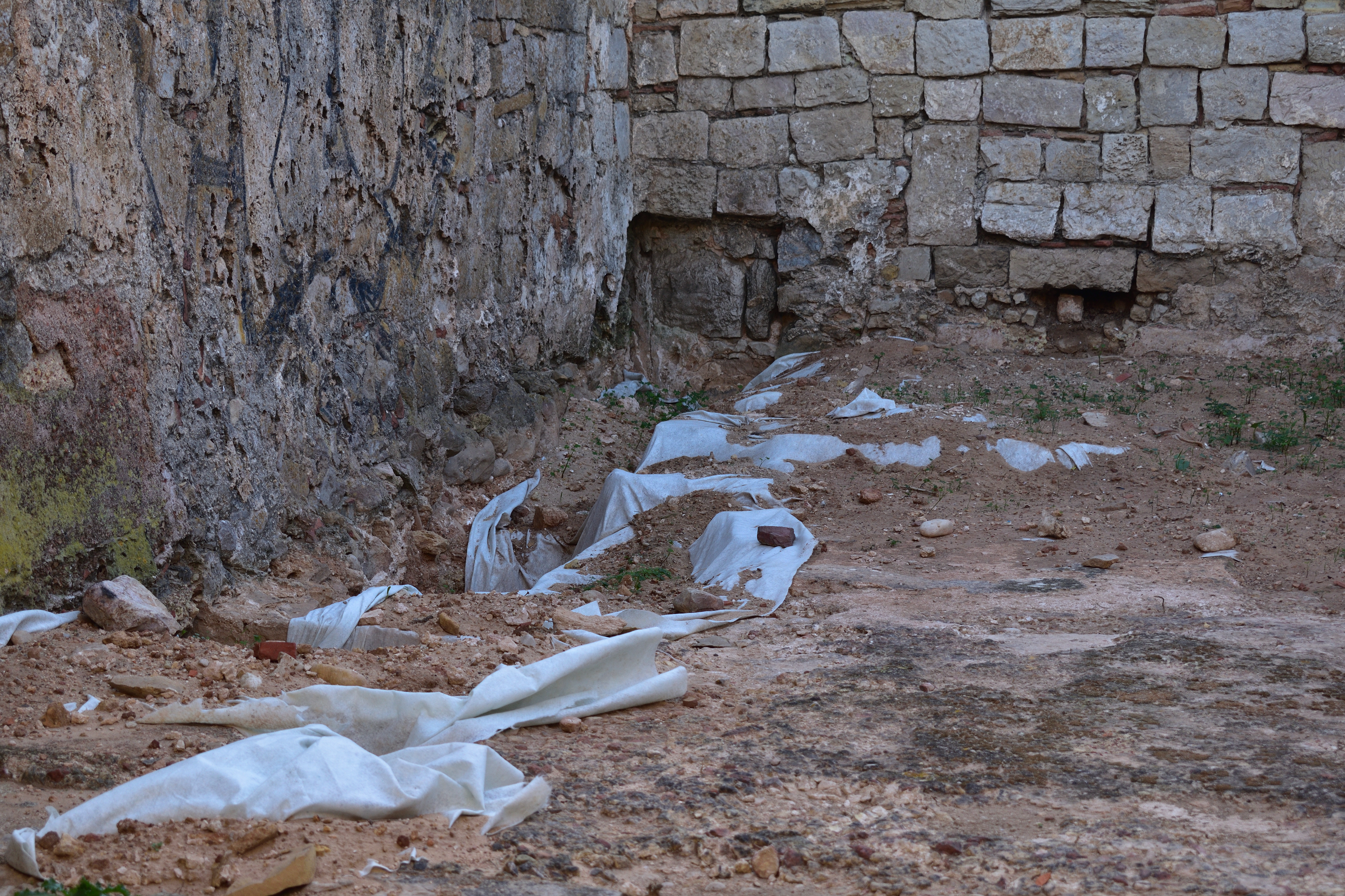 Ruínas romanas da Boca do Rio, no concelho de Vila do Bispo, em Portugal.